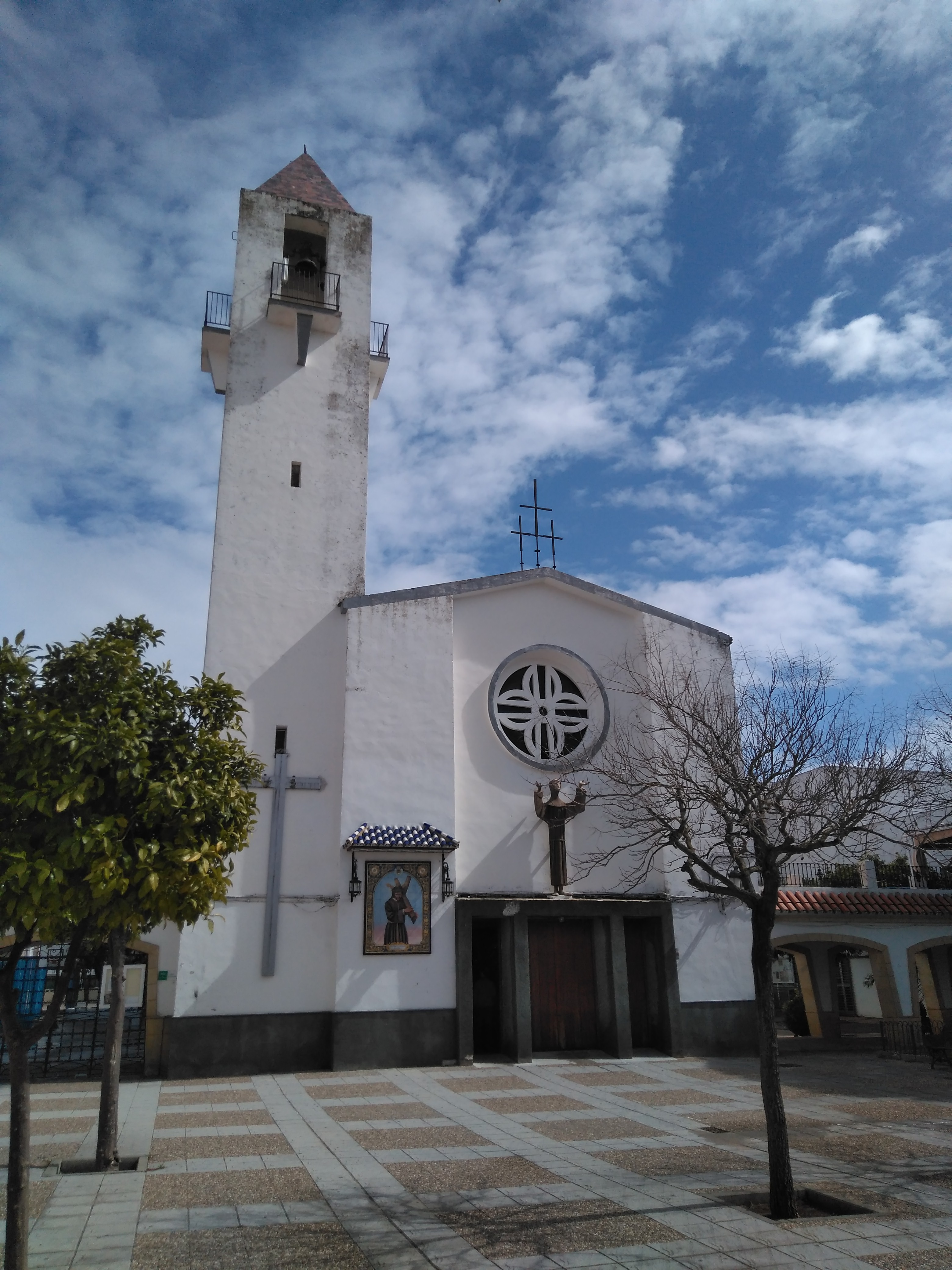 fachada Iglesia Parroquial de San San Enrique y Santa Teresa de Guadalcacín, Jerez de la Frontera